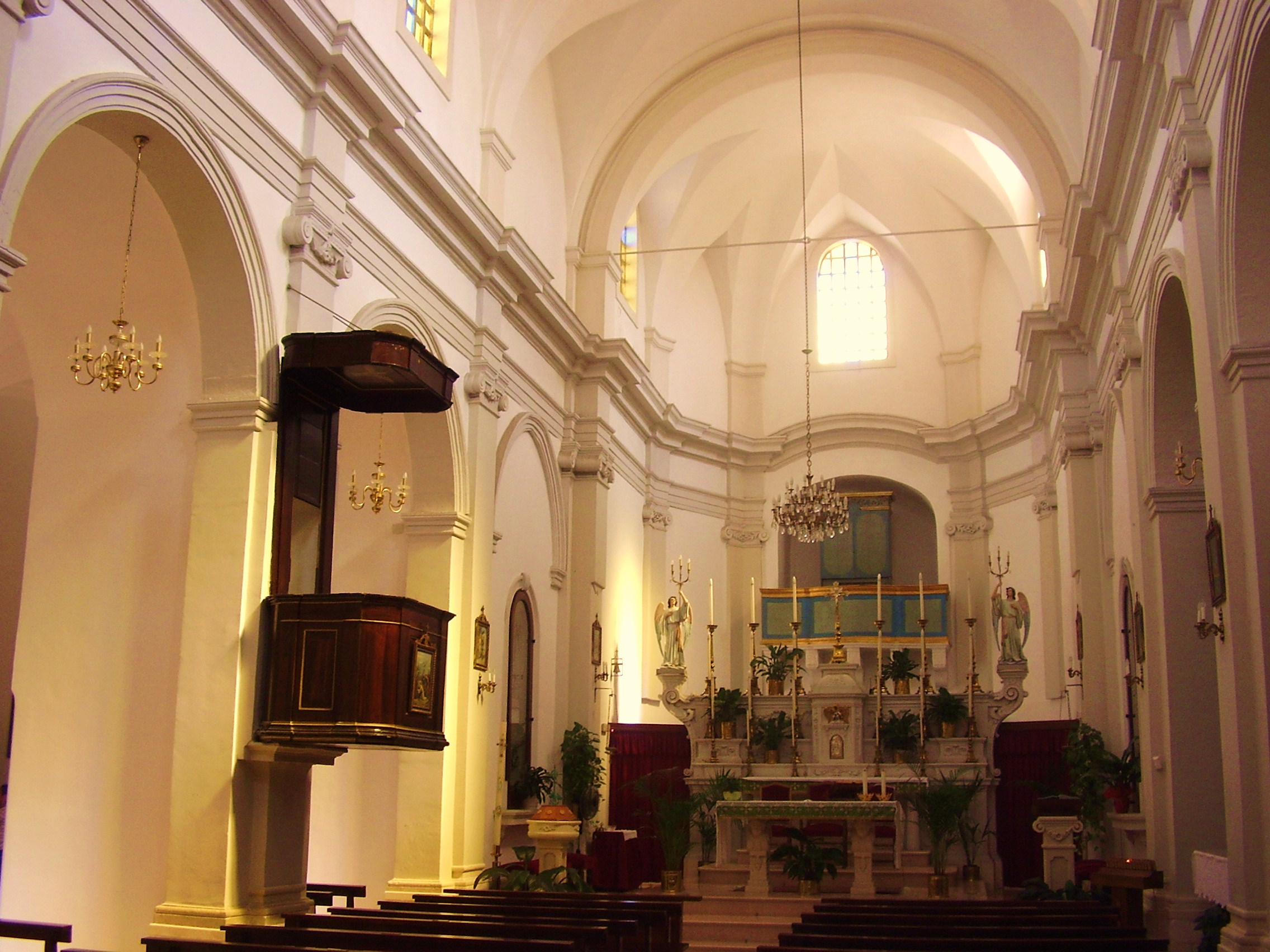 Interno Chiesa di San Cassiano Lecce